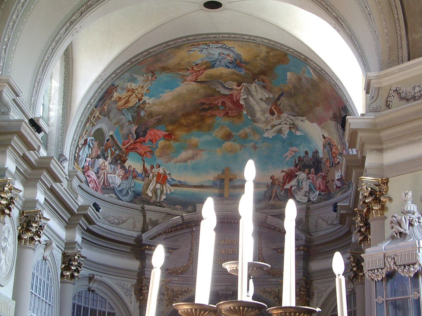 A váci székesegyház